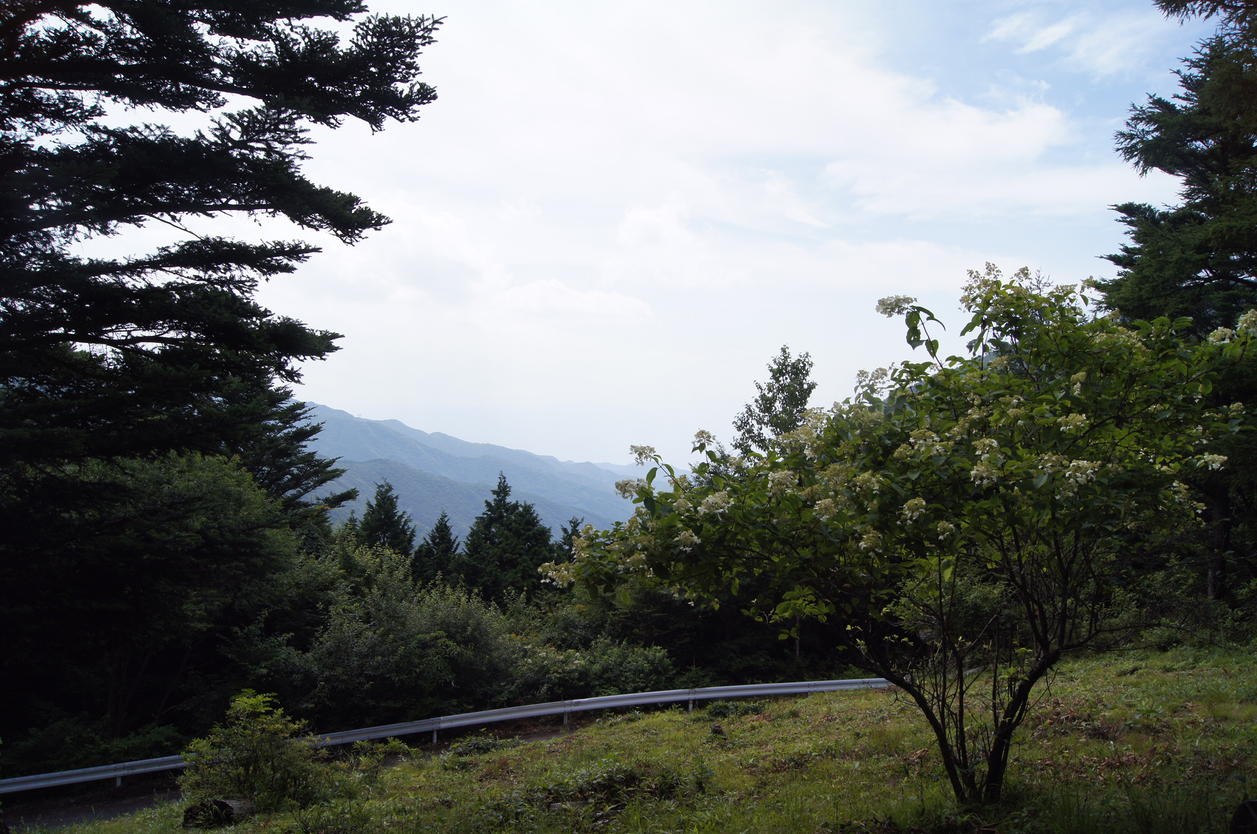 長野県松本市と上田市の間にある保福寺峠から北アルプス方向を望んだもの。残念ながら、この日は曇天で、アルプスは見えなかった